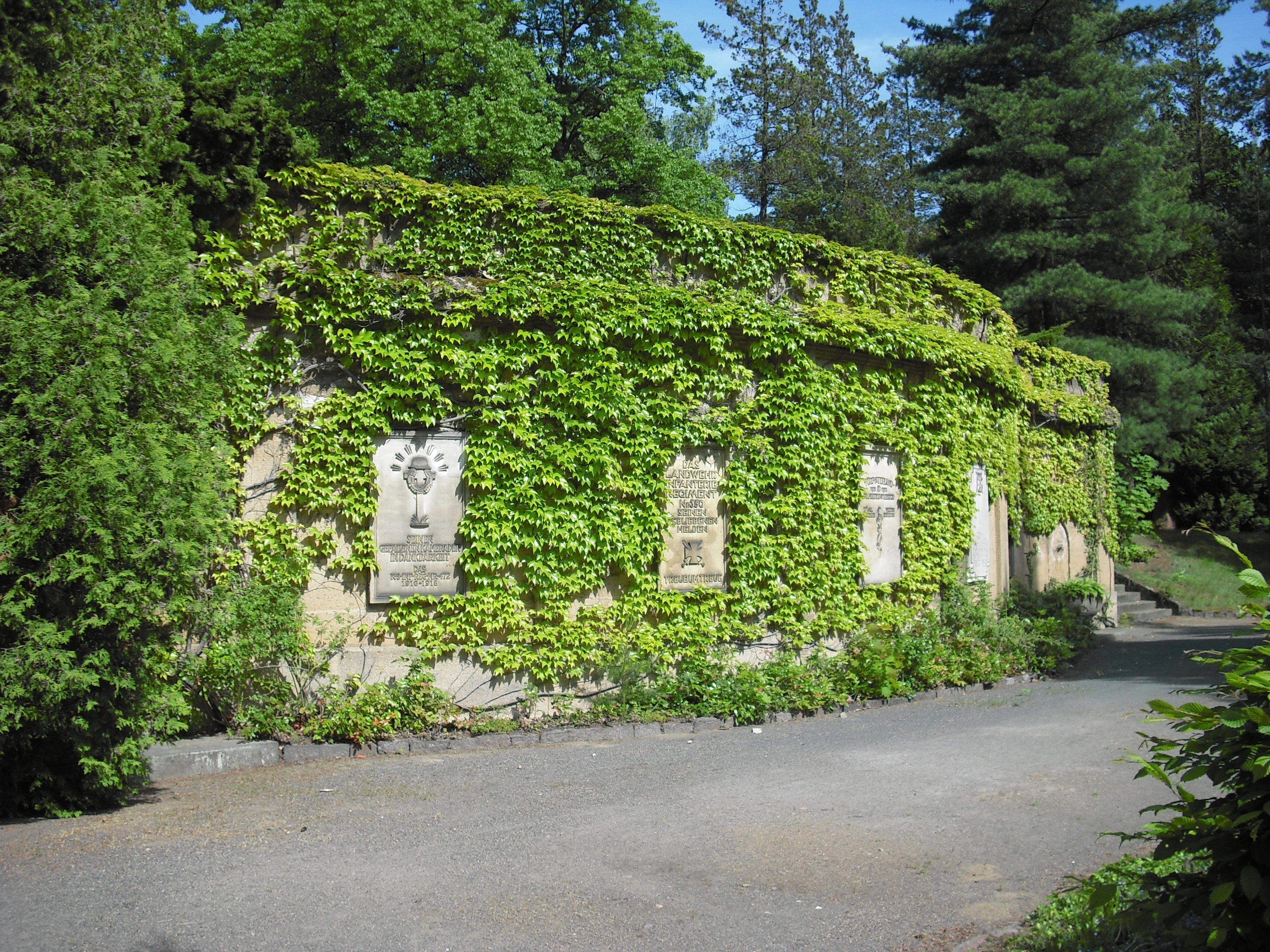 Aufgang zum Ehrenhain auf dem Dresdner Nordfriedhof für die gefallenen Soldaten des 1. Weltkrieges der Dresdner Garnison